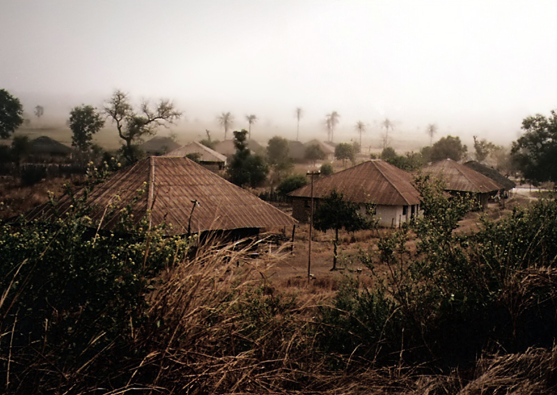 Harmattan